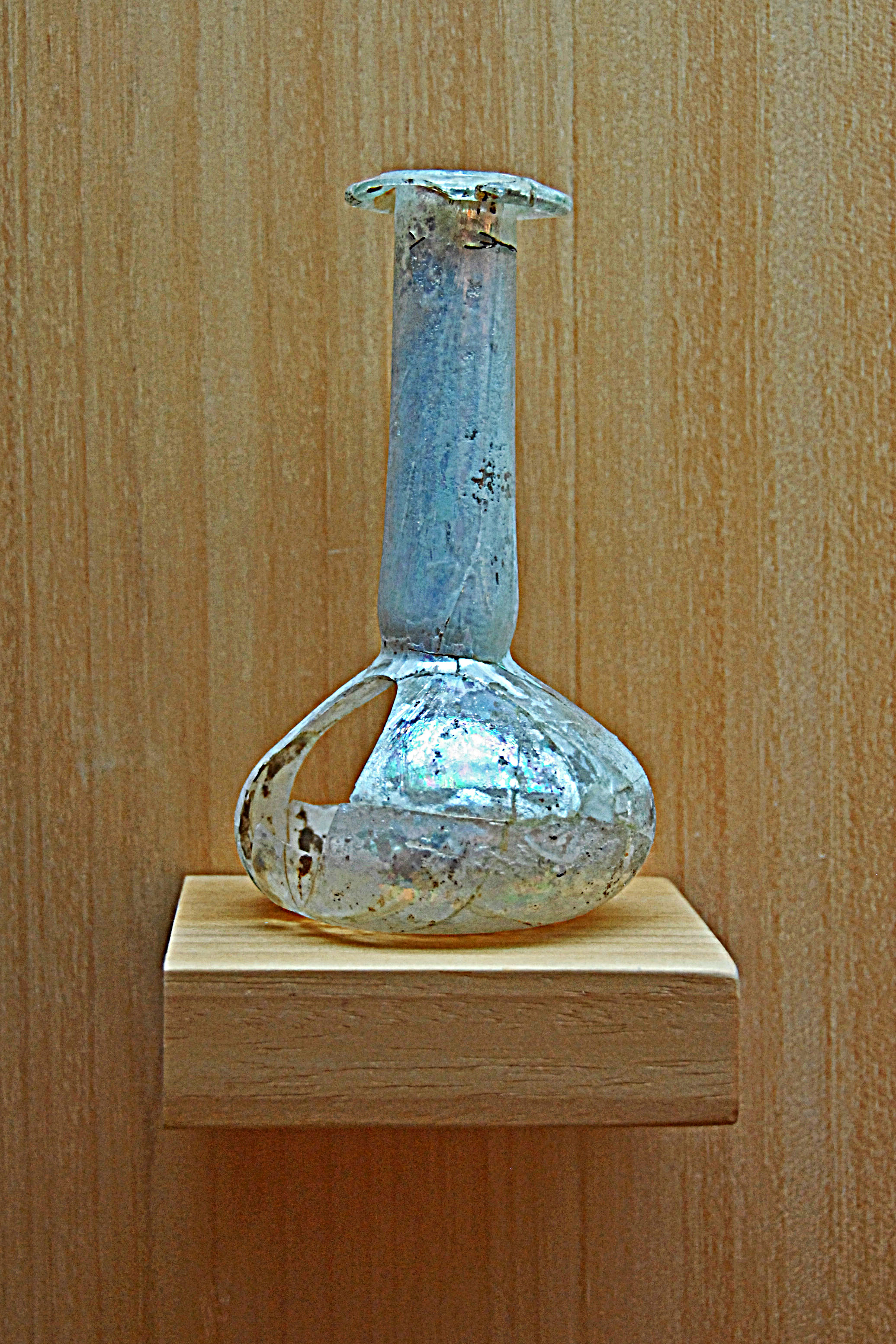 Civaux, Museum, gallorömischer Balsamierungsflakon aus Glas